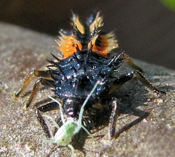 Marienkäferlarve, die eine Blattlaus frisst